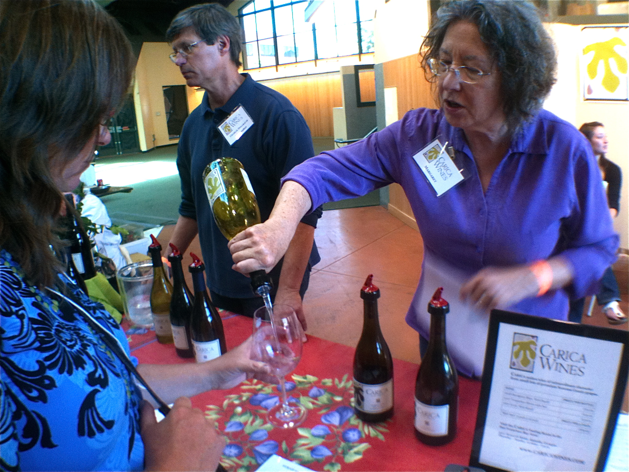 Carica Wines à la Urban wine experience